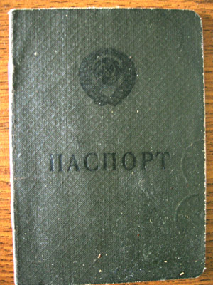 паспорт СССР до 1974 года / Pasaporte de la URSS del año 1974